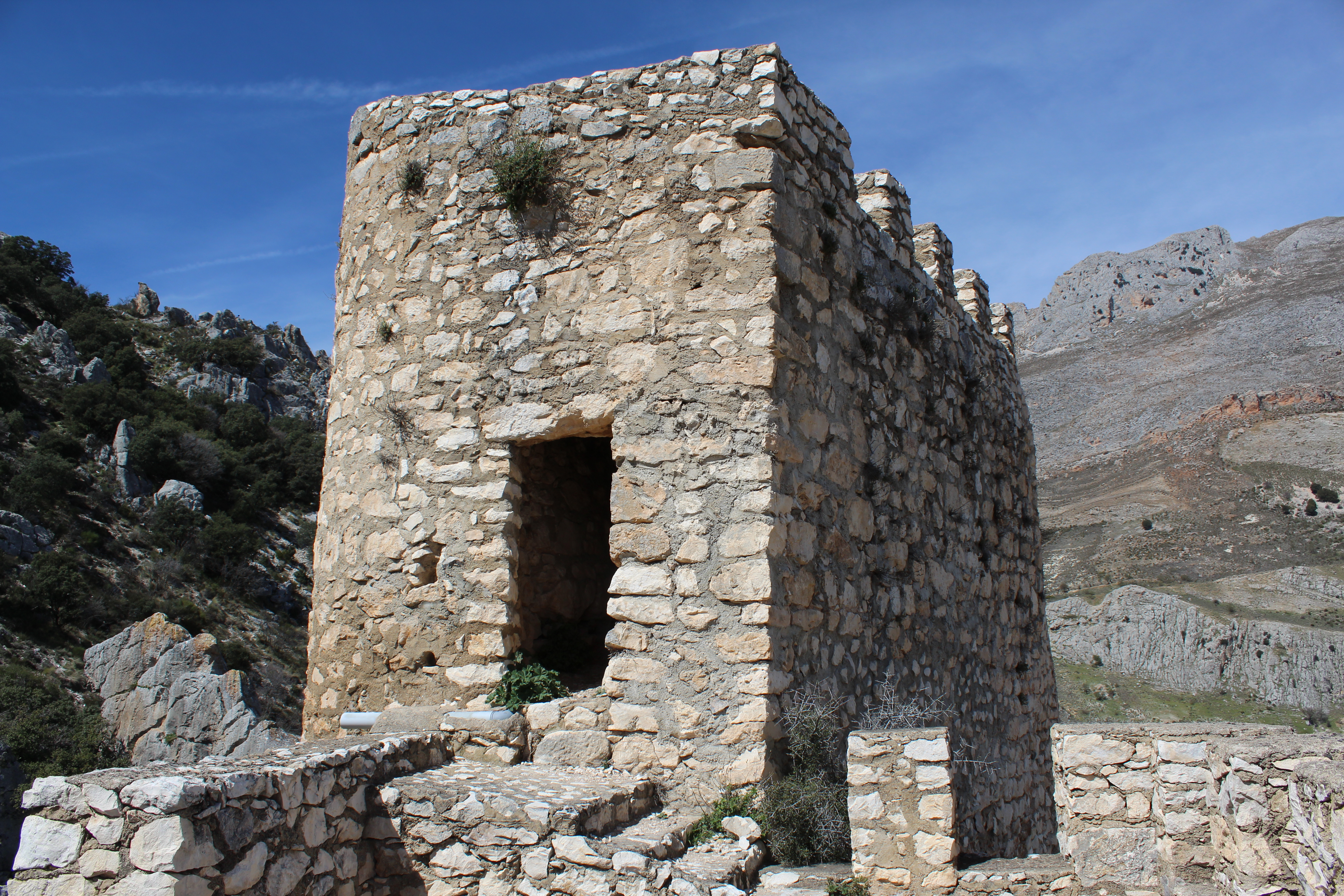 Torre del alcazarejo del castillo de Albanchez de Mágina.